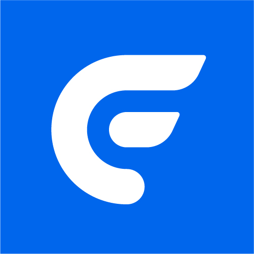 Flitto Icon